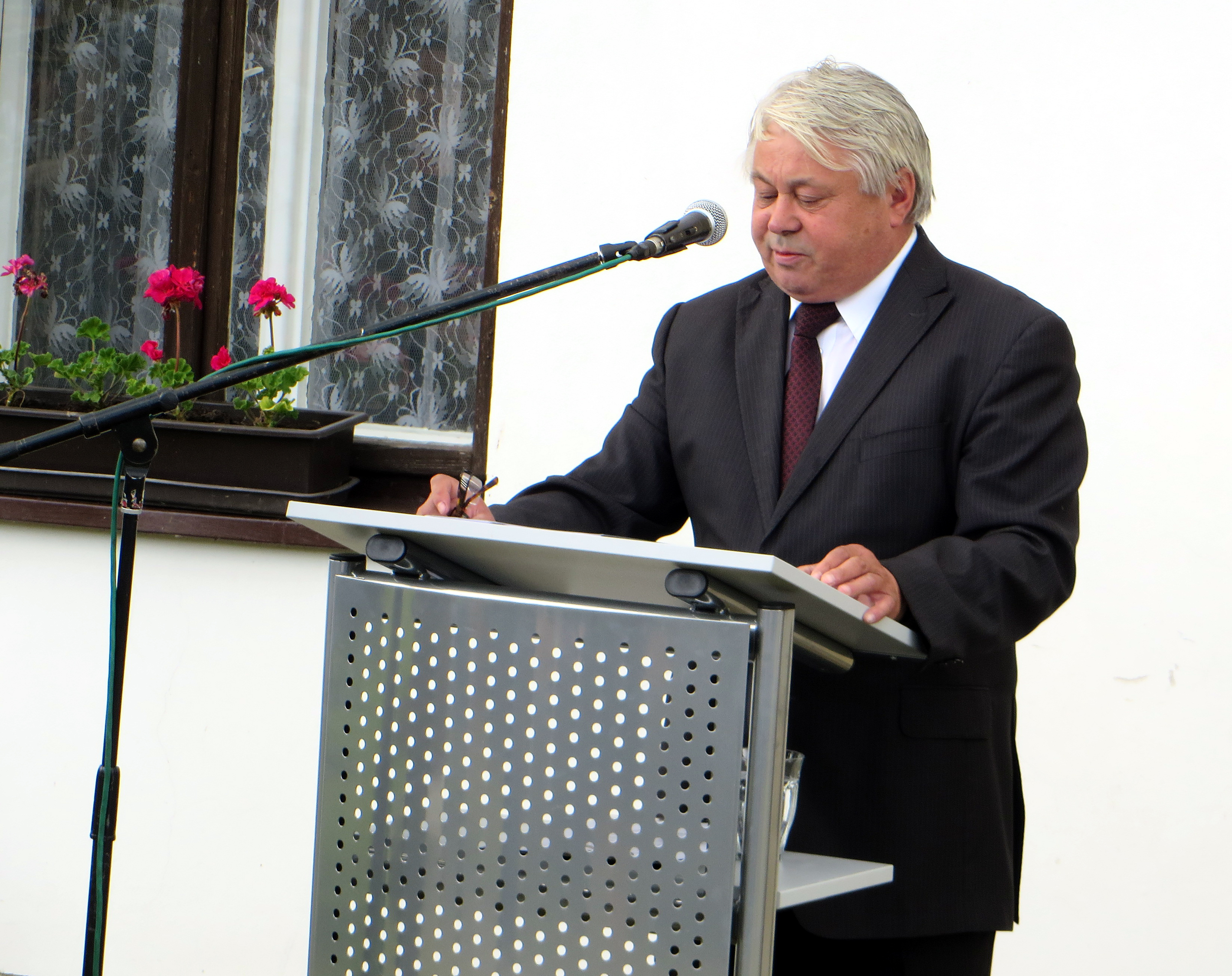 Senice. Pietní akt k uctení památky skupiny Silver A. Senátor Josef Táborský.